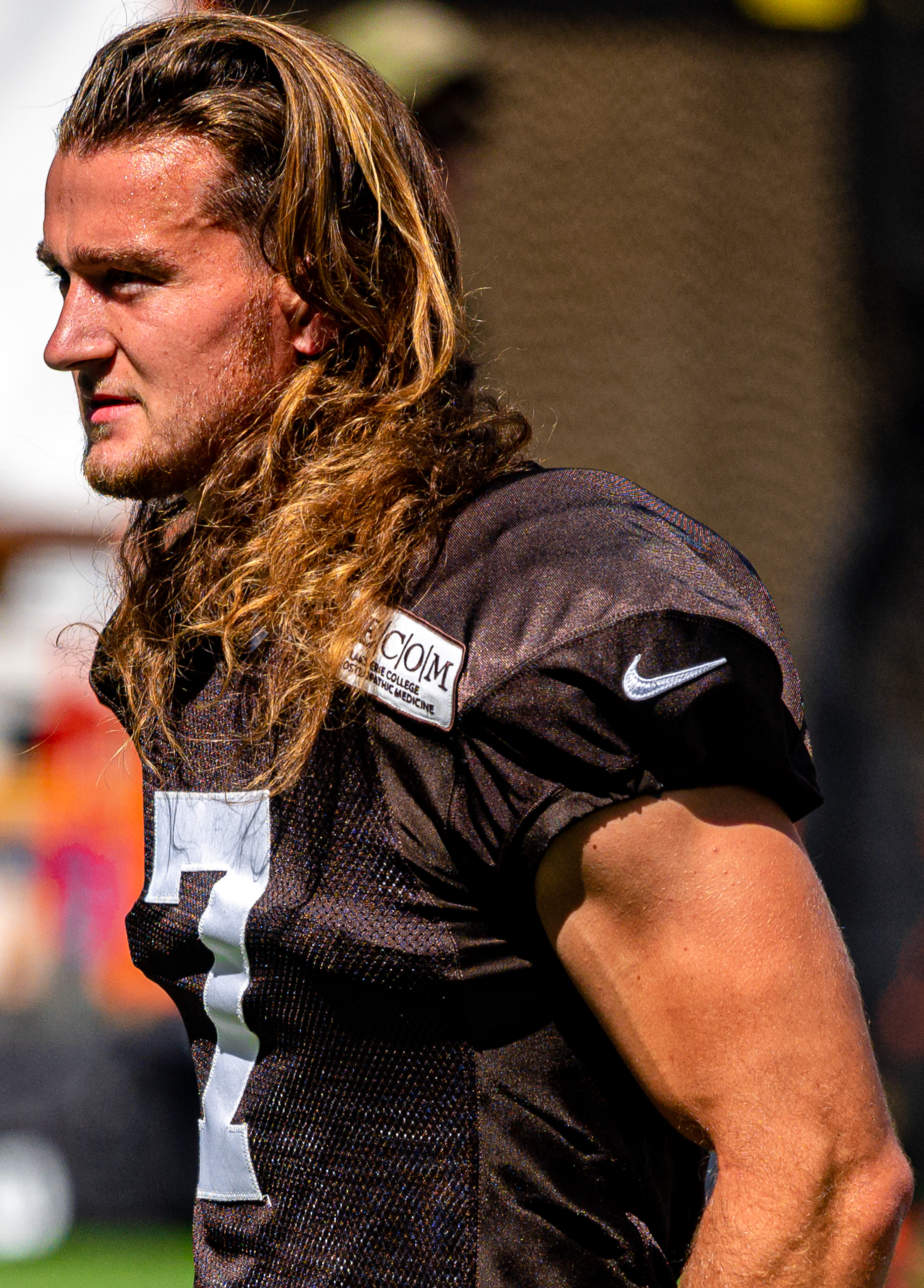 Jamie Gillan